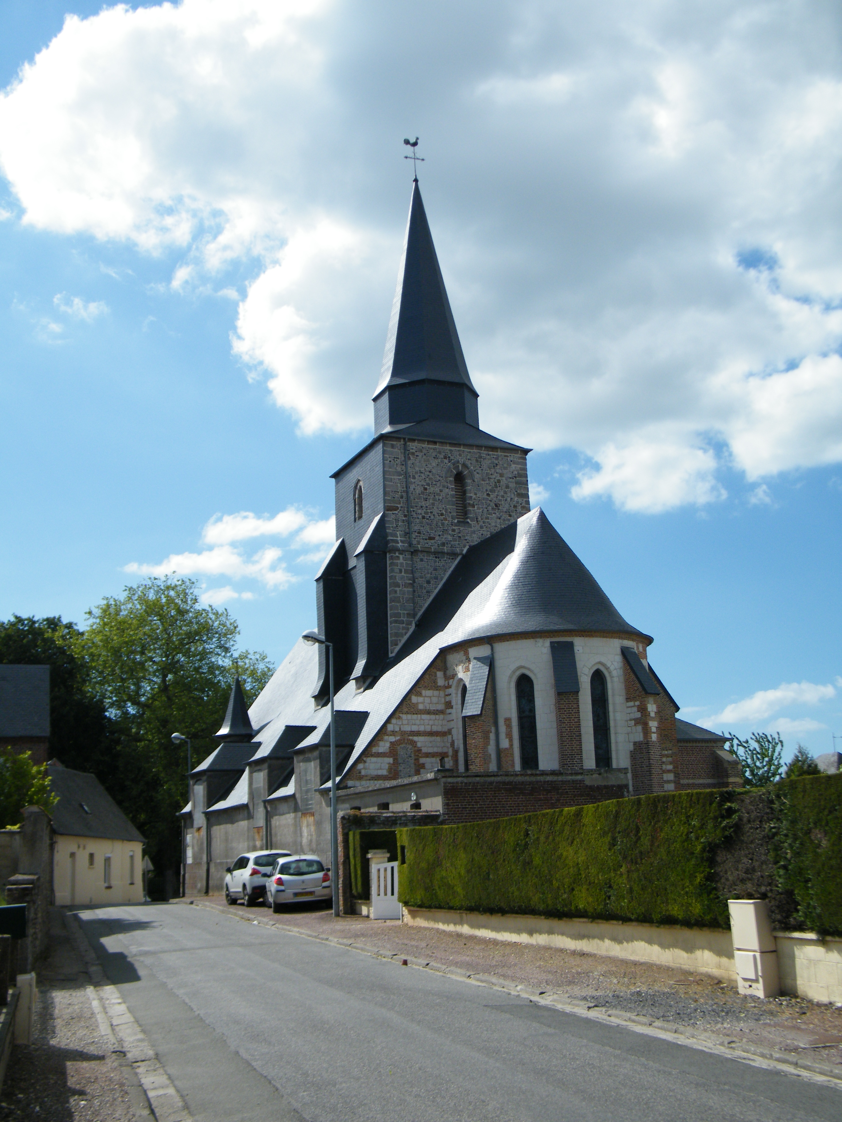 L'église.